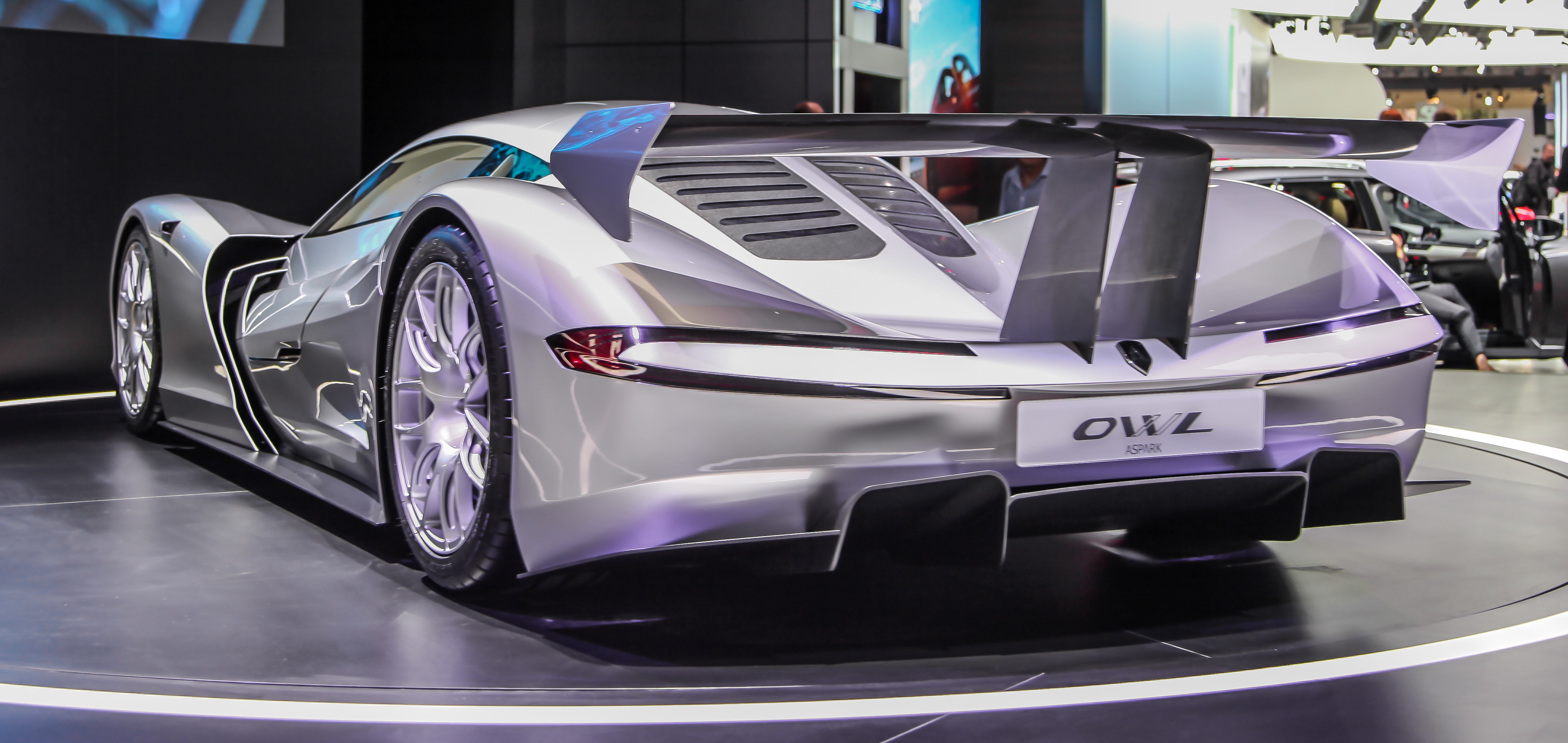 Aspark Owl